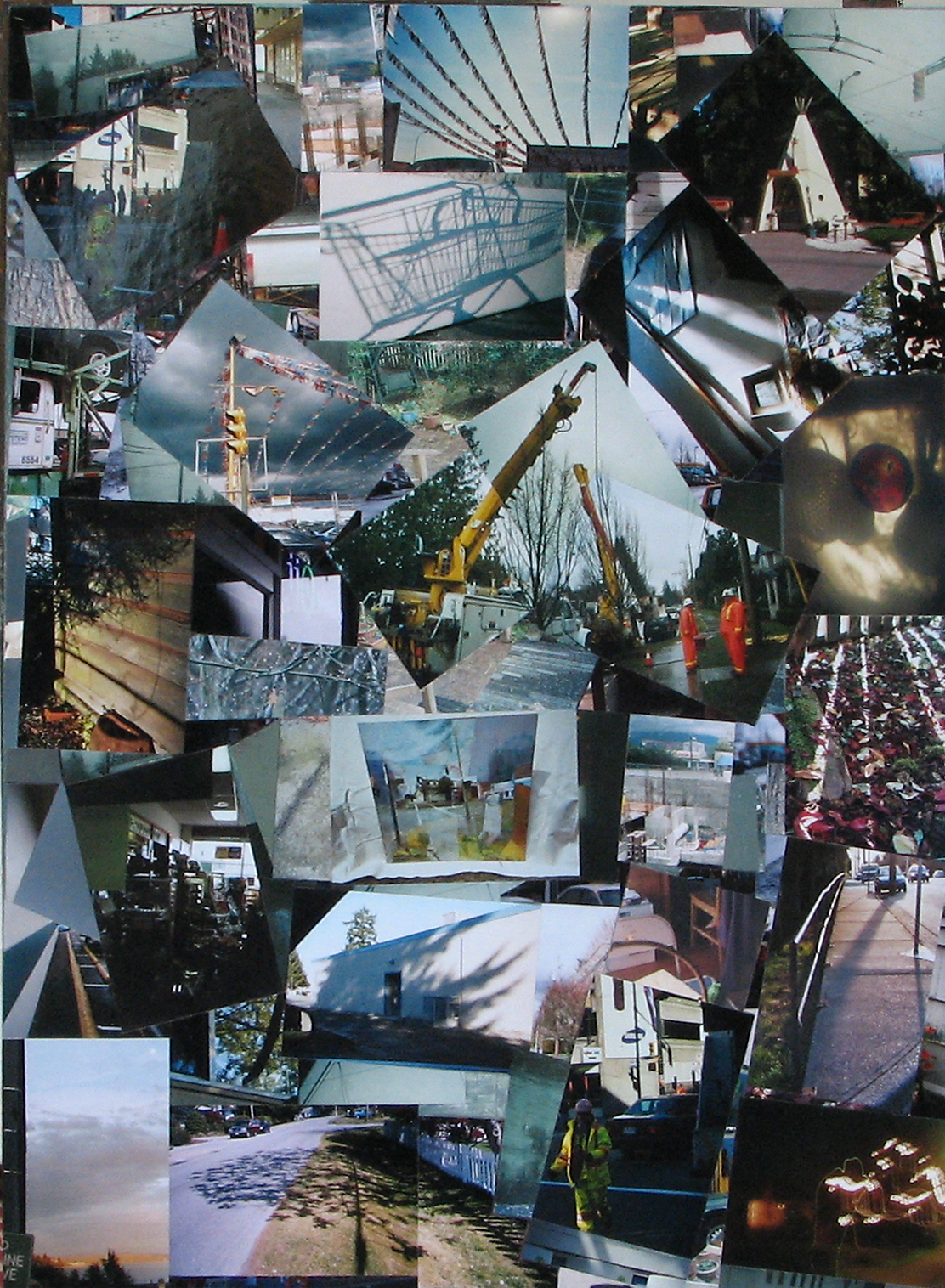 photo-collage, 78 X 58 cm